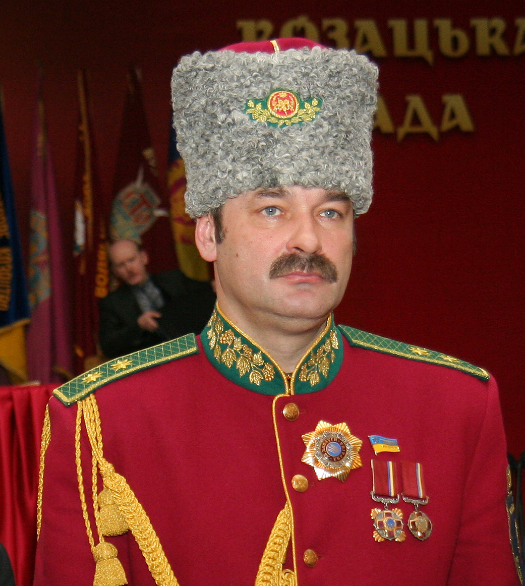 Реестровое казачество